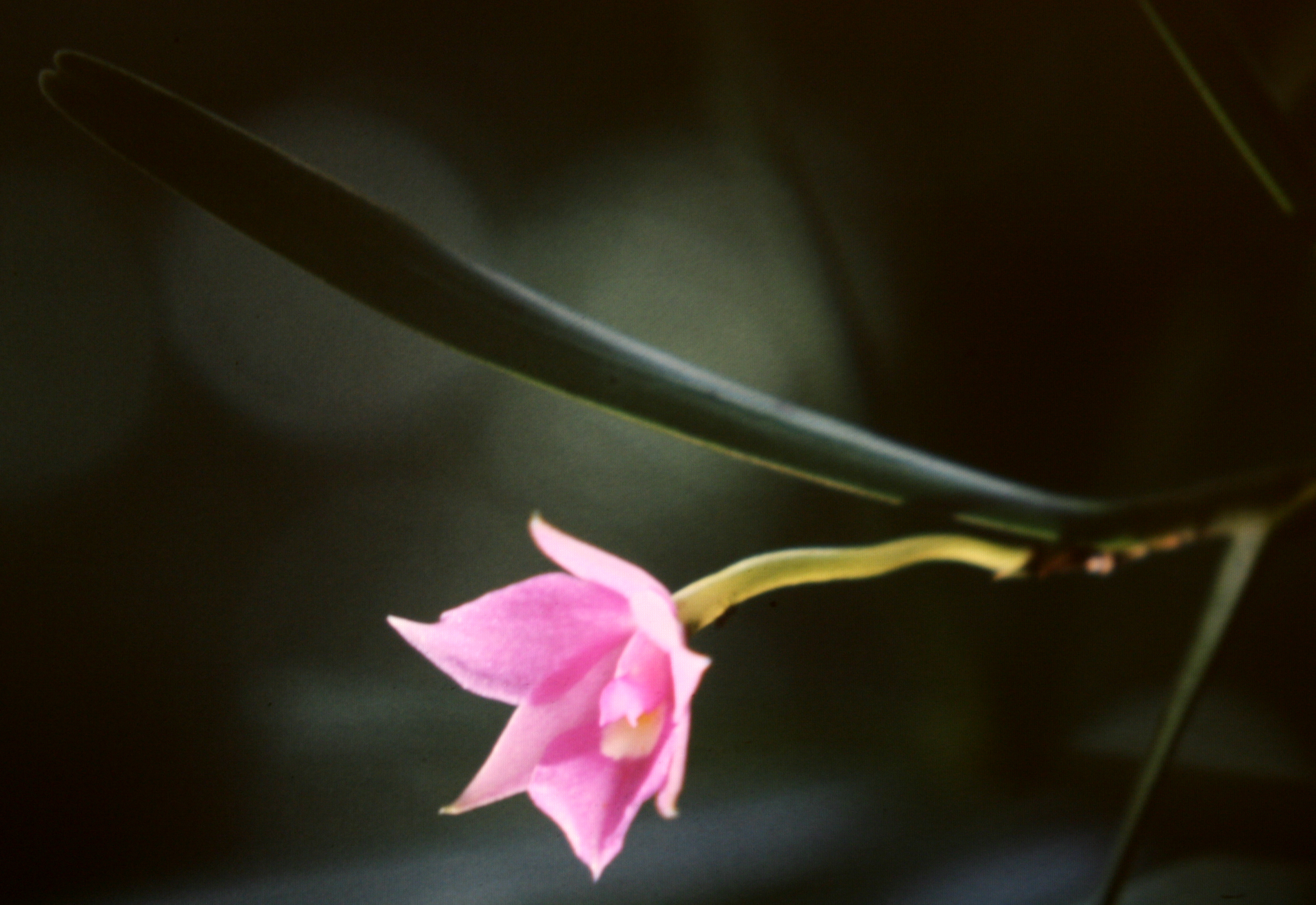 Dimerandra stenopetala (syn. Epidendrum stenopetalum), Suriname.